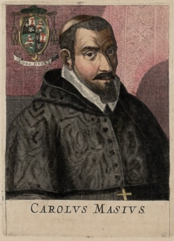 Bisschop Carolus Maes - Afbeelding uit Flandria Illustrata (1641)